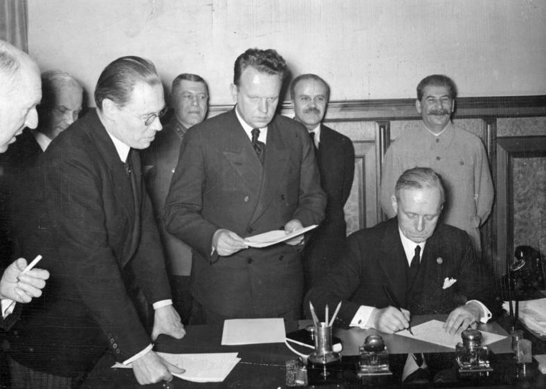 Dtsch.-Sowjet. Grenz- u. Freundschaftsvertrag Scherl: Die Unterzeichnung in Moskau. Als Ergebnis der Moskauer Besprechungen wurde vom Reichsminister des Auswärtigen v. Ribbentrop und vom Vorsitzenden des Rates der Volkskommissare und Außenkommissar Molotow im Kreml eine gemeinsame politische Erklärung und der Freundschaftsvertrag zwischen der Reichsregierung und der Regierung der UdSSR unterzeichnet. Unser Bild zeigt Reichsaußenminister v. Ribbentrop während der Unterzeichnung. Links neben ihm der sowjetrussische Botschafter in Berlin Schkarzew; dahinter (von rechts) Stalin, Außenkommissar Molotow und der Generalstabschef der sowjetrussischen Armee Stapostnikow. ADN-ZB/Archiv Sowjetunion, September 1939 In Moskau wird am 28.9.1939 zwischen dem Deutschen Reich und der UdSSR ein Grenz- und Freundschaftsvertrag sowie eine gemeinsame politische Erklärung unterzeichnet. Der deutsche Reichsaußenminister Joachim von Ribbentrop während der Unterzeichnung; stehend v.r. J. W. Stalin, der Vorsitzende des Rates der Volkskommissare W. M. Molotow, der sowjetische Botschafter in Berlin Schkwarzew und der sowjetische Generalstabschef B. M. Schaposchnikow. 11983-39 Abgebildete Personen: Ribbentrop, Joachim von: Außenminister, NSDAP, Deutschland Molotow, Wjatscheslaw Michailowitsch: Außenminister, Sowjetunion (GND 11873461X) Schkwarzew, Alexander: Botschafter in Deutschland, Sowjetunion Schaposchnikow, Boris: Marschall, Sowjetunion (GND 11882600X) Stalin, Josef W.: 1878-1953; Marschall, Vorsitzender des Ministerrates, Generalsekretär der KP, Sowjetunion (GND 118642499) Information added by Wikimedia users. Außerdem im Bild: Friedrich Gaus (ganz links vorne; Leiter der Rechtsabteilung des Auswärtigen Amtes), Graf von der Schulenburg (Hintergrund links neben Schaposchnikow; deutscher Botschafter in Moskau) und Gustav Hilger (vorne rechts von Gaus; Botschaftsrat an der deutschen Botschaft in Moskau).